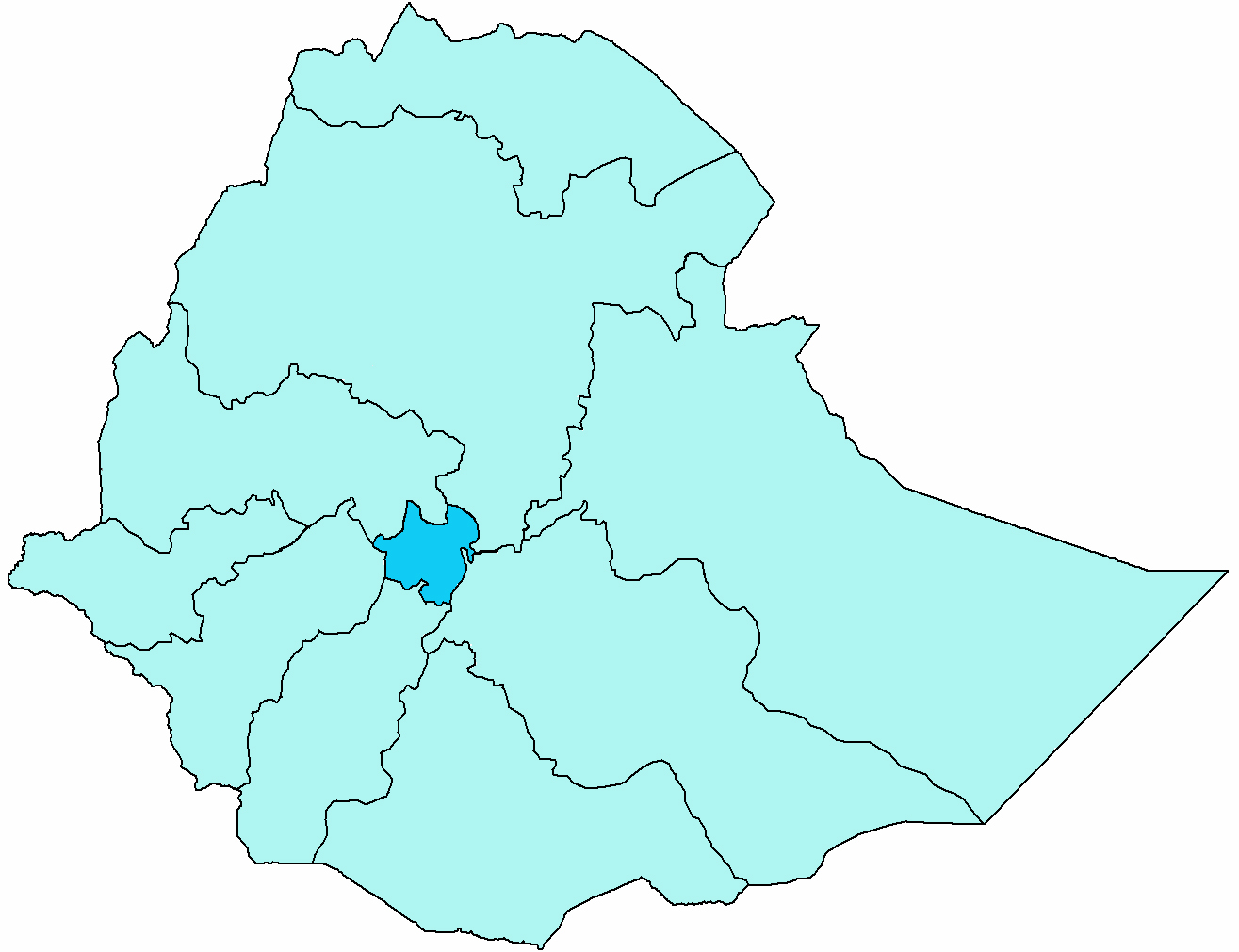 Mappa dell'eparchia cattolica di Emdeber, in Etiopia. Fonte per i confini della diocesi: Ethiopian Catholic Church